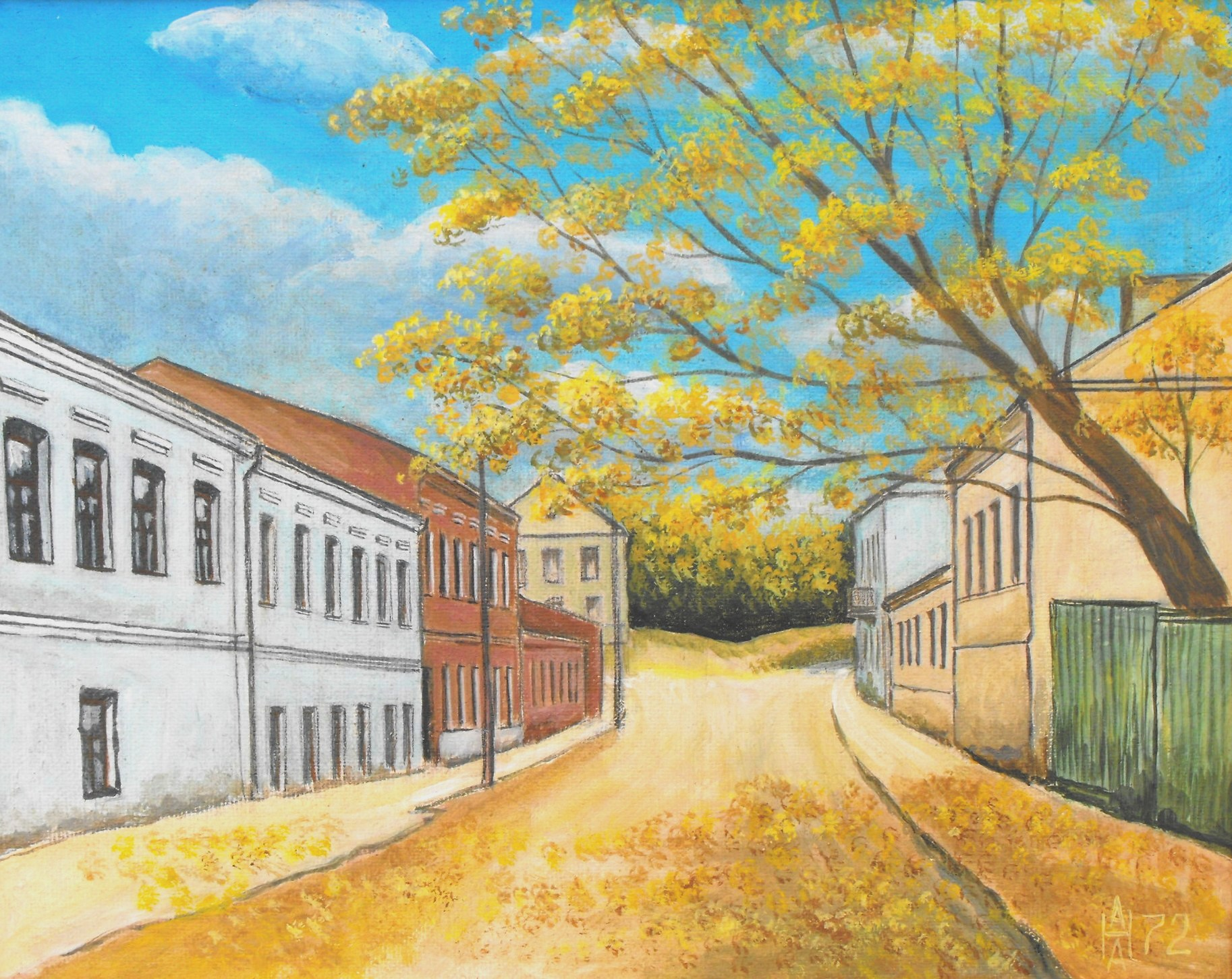 Минск, ул. Замковая. В 1941-1943 гг. - территория Минского гетто. Художник Анатолий Александрович Наливаев. Яичная темпера. ДВП. 1972 год. Подарена автором минскому Музею истории и культуры евреев Беларуси.